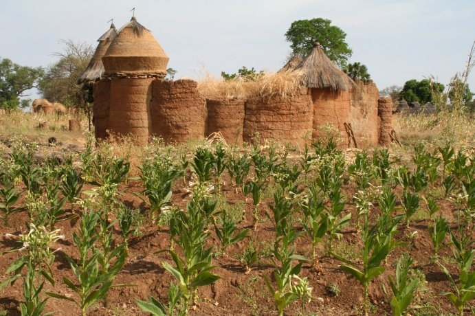 Tata Somba in Benin